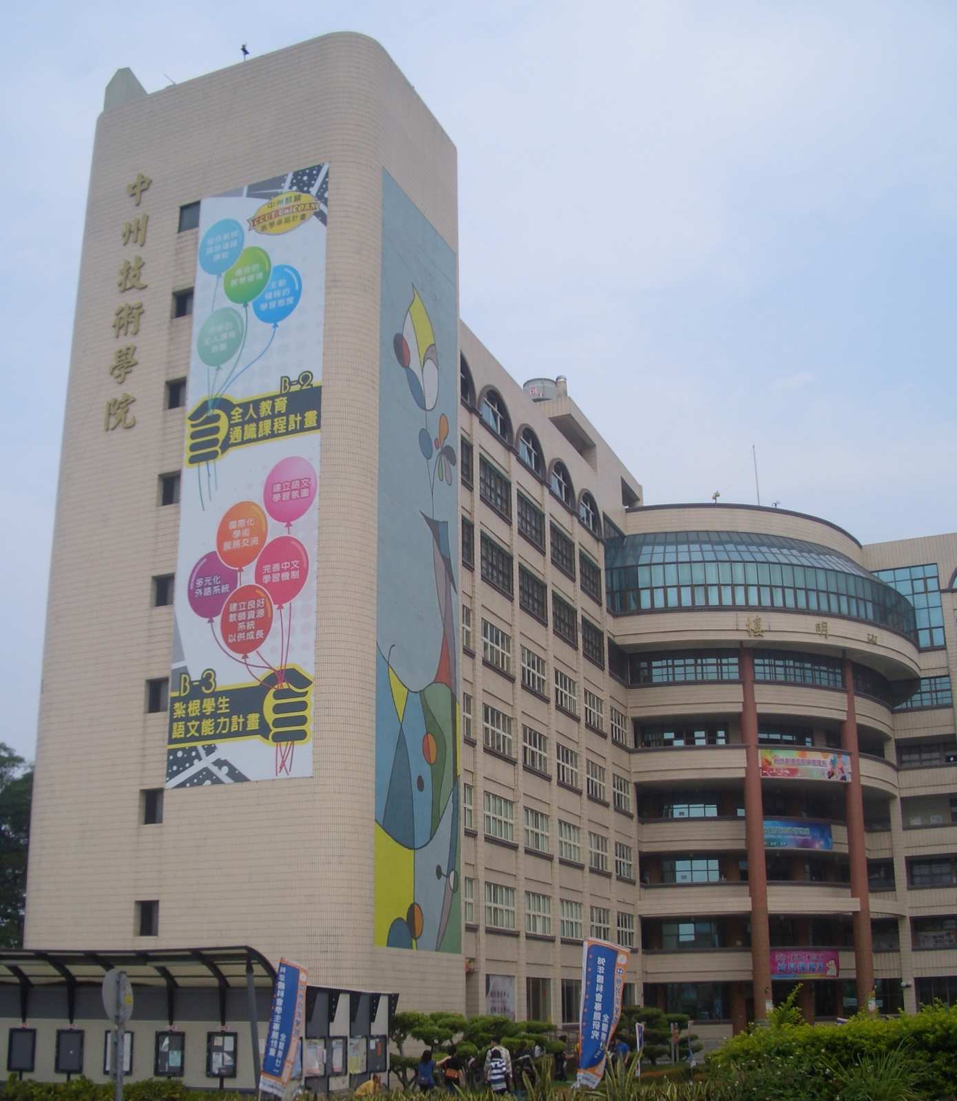 中州技術學院沁明樓。